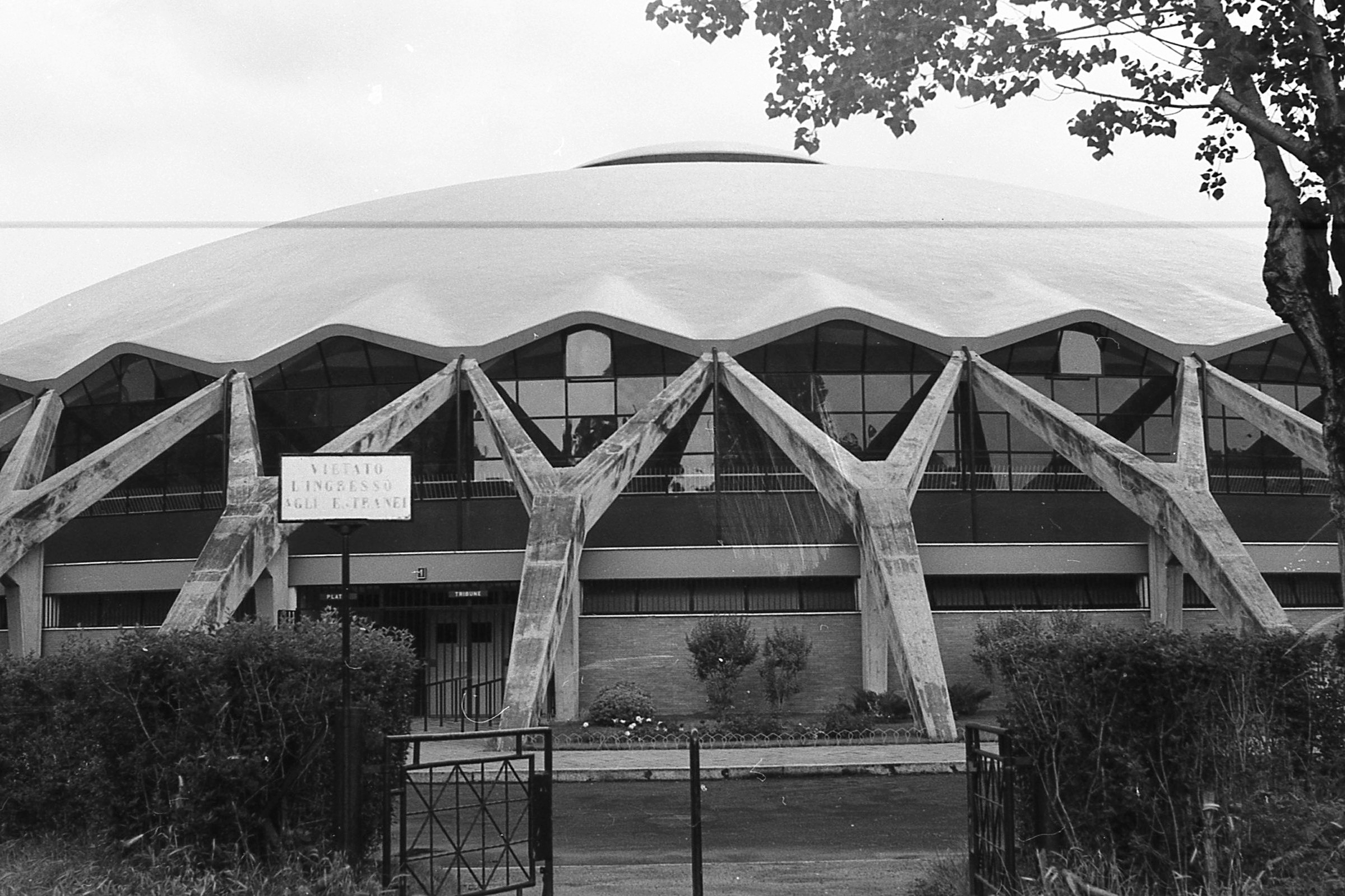 Palazzetto dello Sport sportcsarnok. Location: Italy, Rome Tags: sport hall, modern architecture Title: Palazzetto dello Sport sportcsarnok.